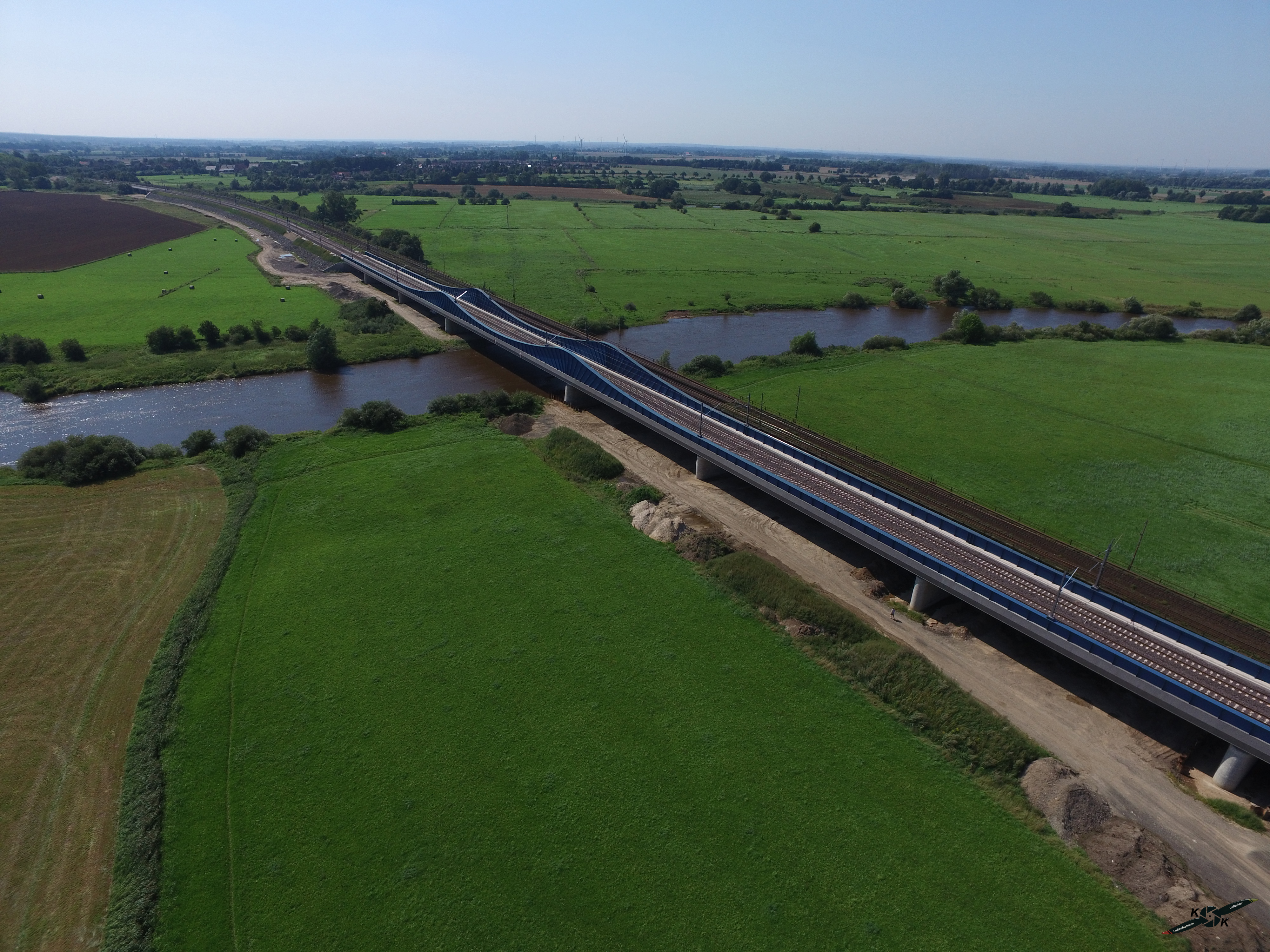 Luftaufnahme Verden Eisenbahnbrücke Neubau